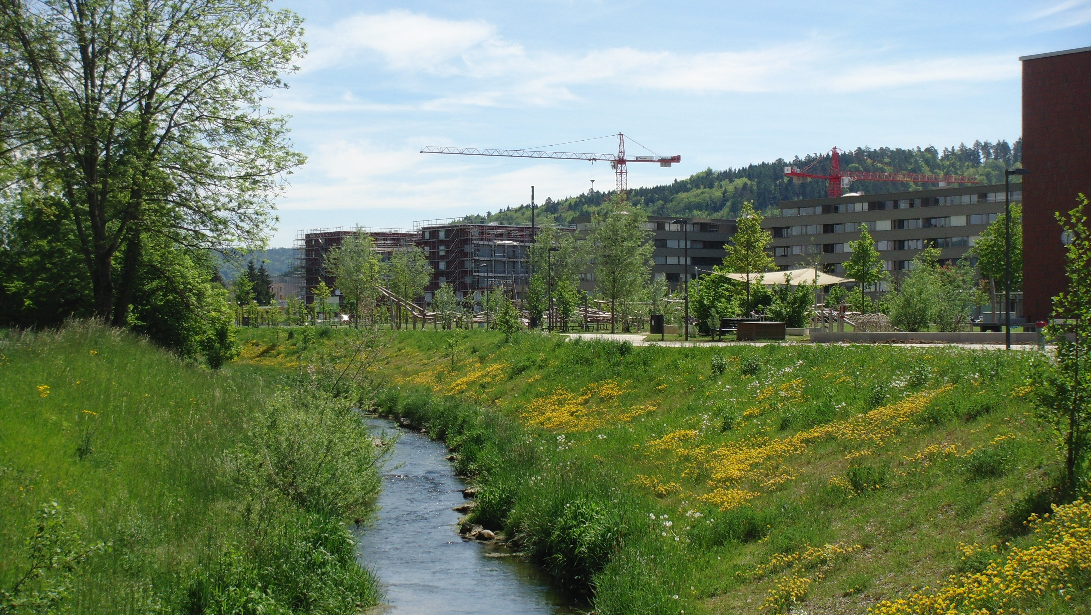 Stadtentwicklungsgebiet Neuhegi - Eulach